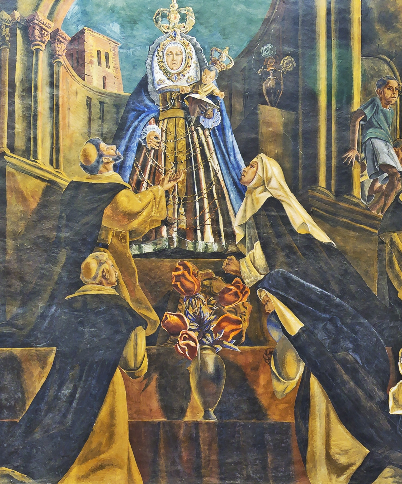 Fresco realizado por Mariano de Cossío y Martínez en 1940 que se encuentra en la Parroquia de Santo Domingo de Guzmán en la ciudad de San Cristóbal de La Laguna (Tenerife, Islas Canarias, España). En esta secuencia aparece la Santísima Virgen entregando el Santo Rosario a Santo Domingo de Guzmán, en la escena también aparecen Fray Pedro de Santa María y Ulloa, Santa Catalina de Siena y Sor María de Jesús ("La Siervita").